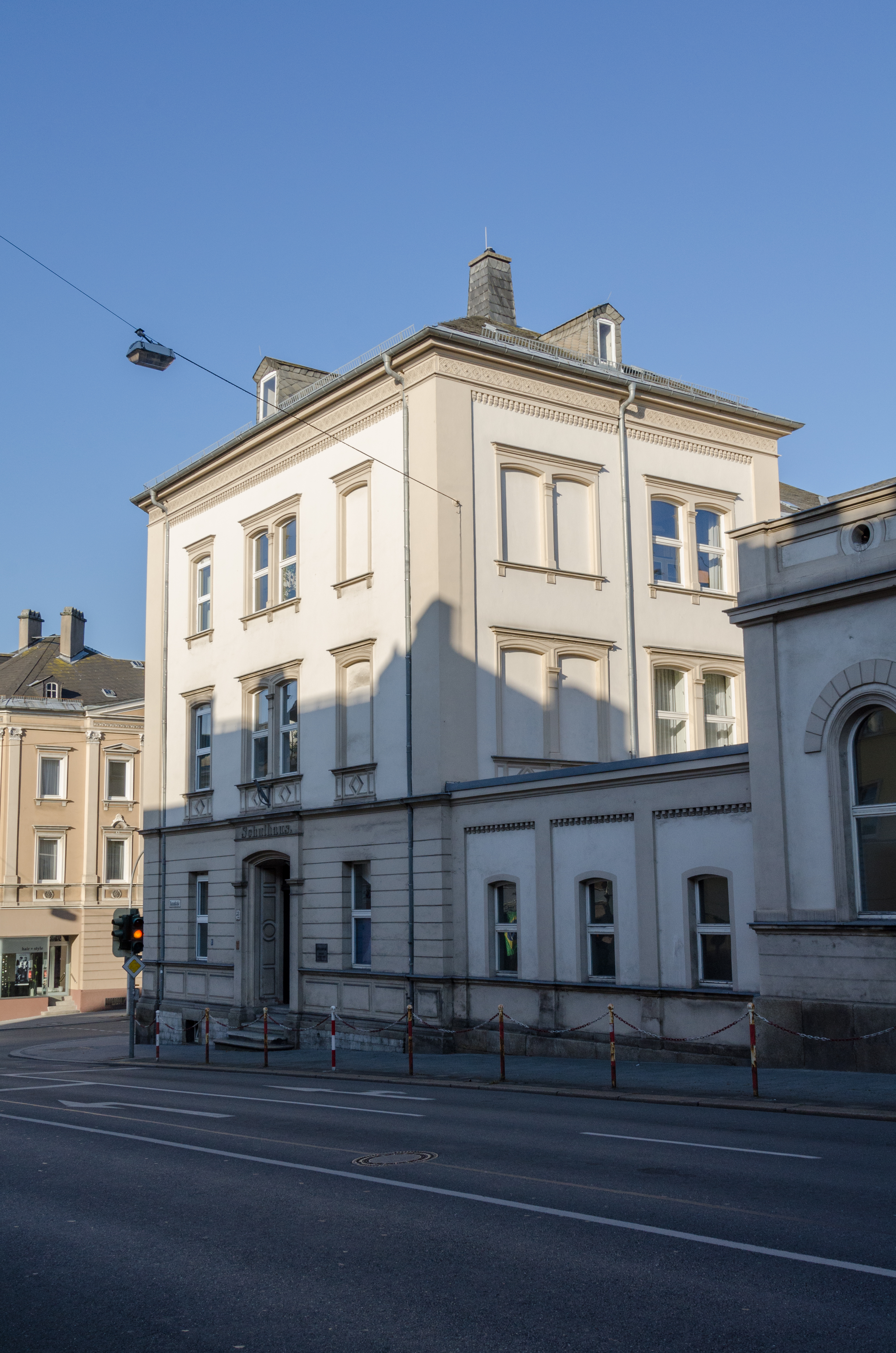 Hof, Marienstraße 38